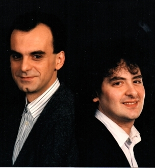 DYVA - Max & Roby